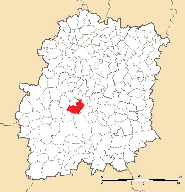 Carte de position d'Étréchy en Essonne (91)